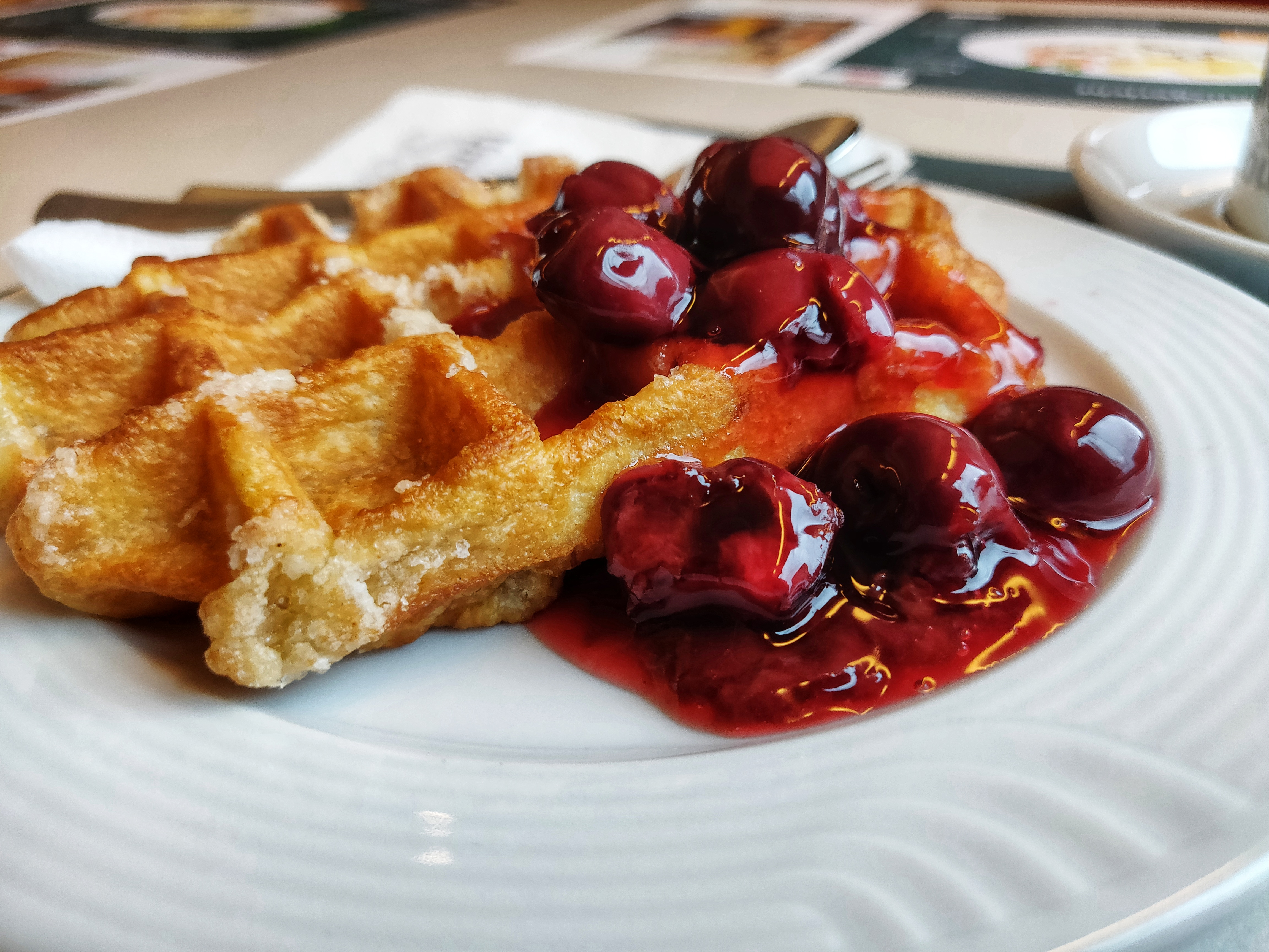 2018-08-30 // ICE 9572 // Stuttgart - Strasbourg